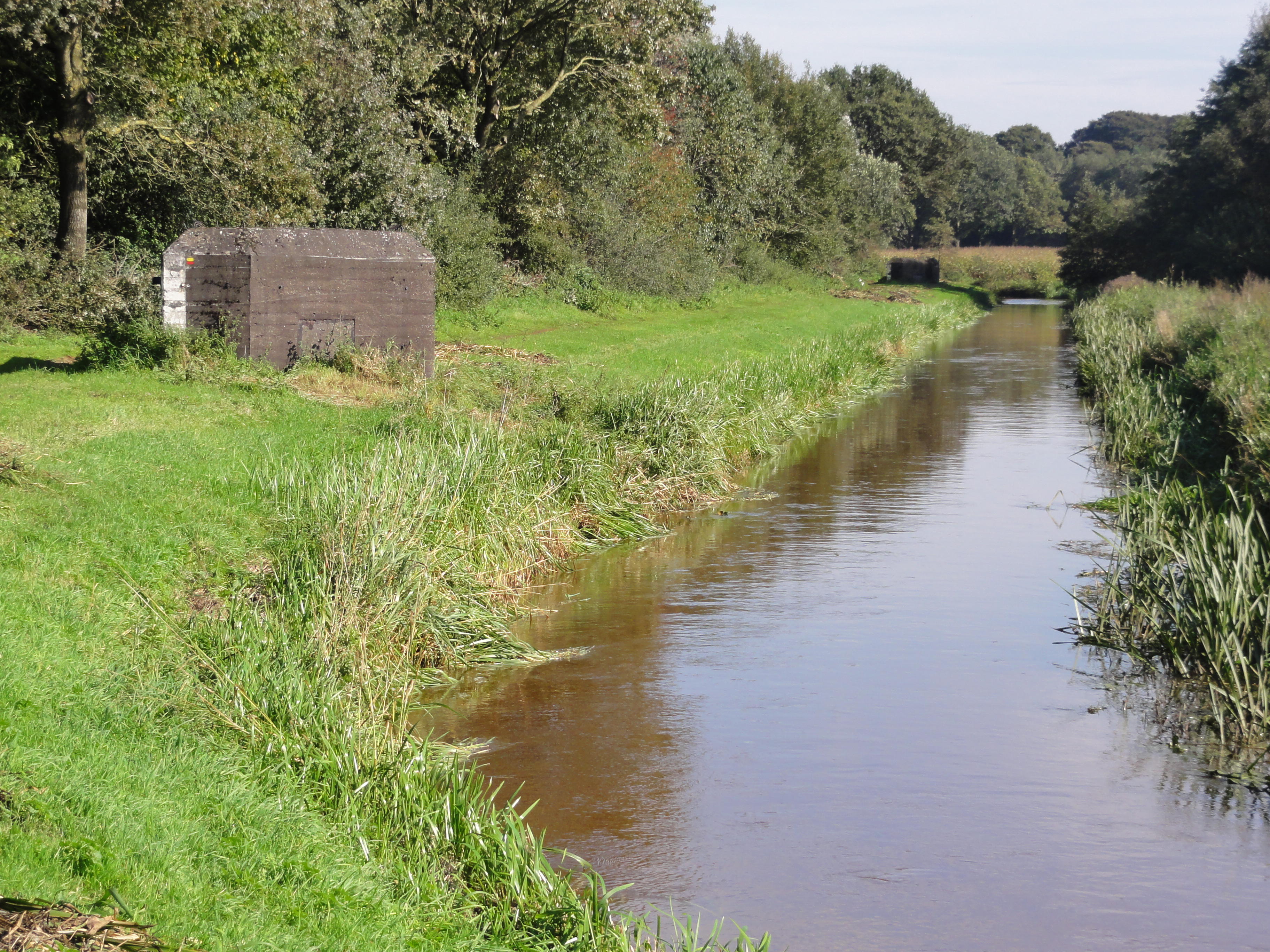 Mill Rijksmonument 525563 S-kazemat 531 langs Defensiekanaal 26″ N, 5° 45′ 49.16″ E